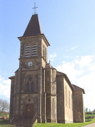 Eglise Saint-Michel